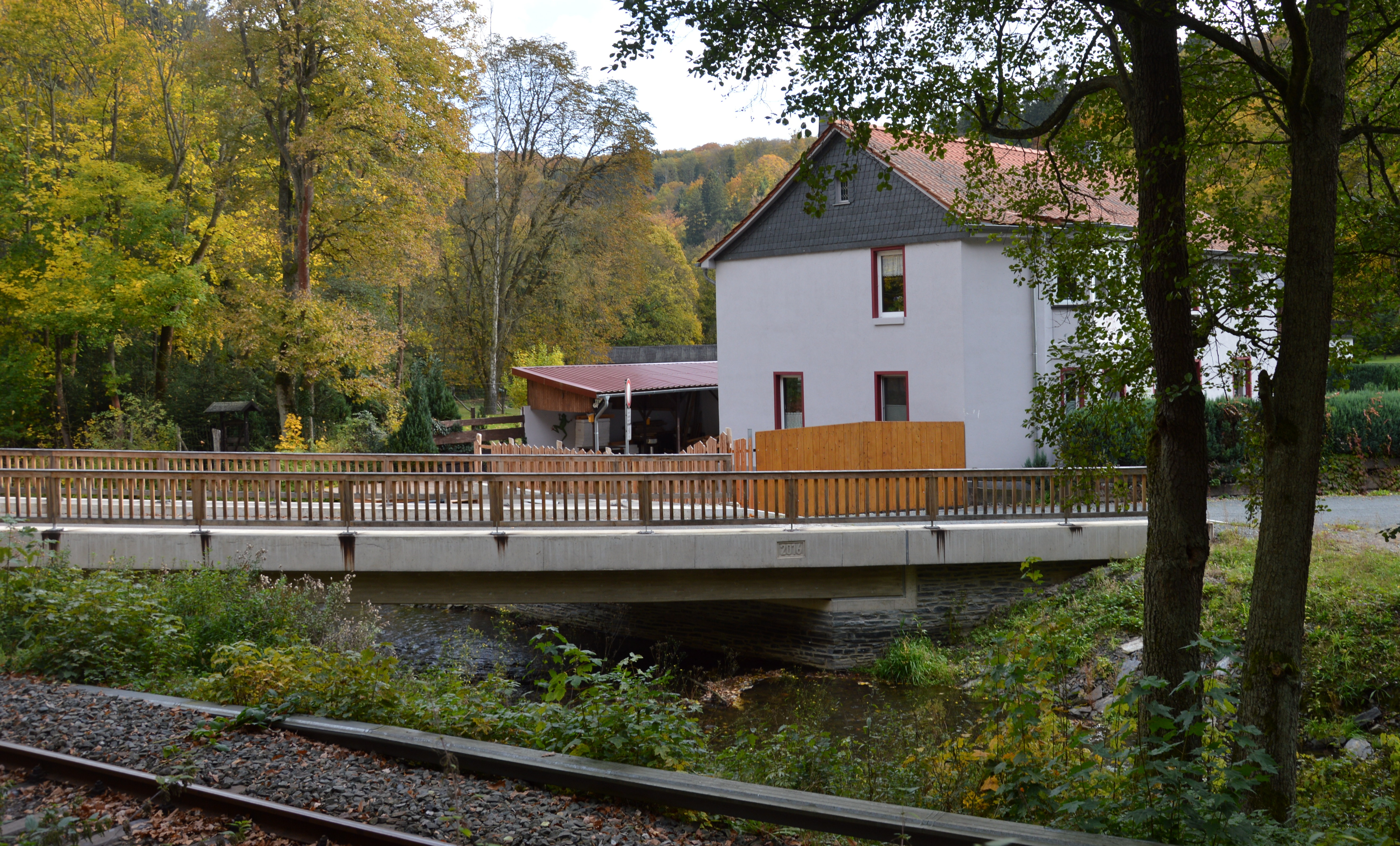 Selkebrücke an der Klostermühle 2017